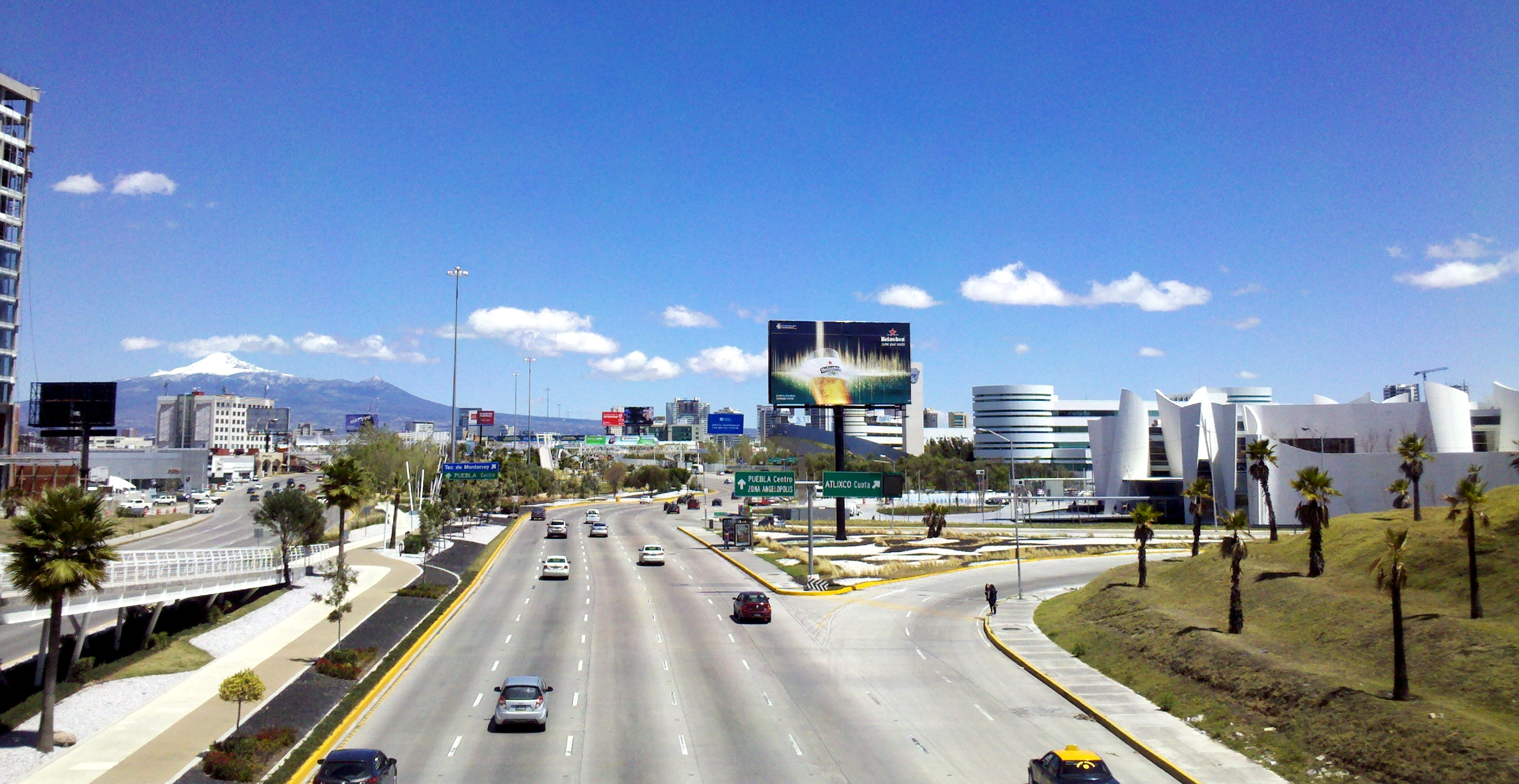 Tramo de la Vía Atlixcáyotl en Puebla, México, casi esquina con Bulevar Municipio Libre.